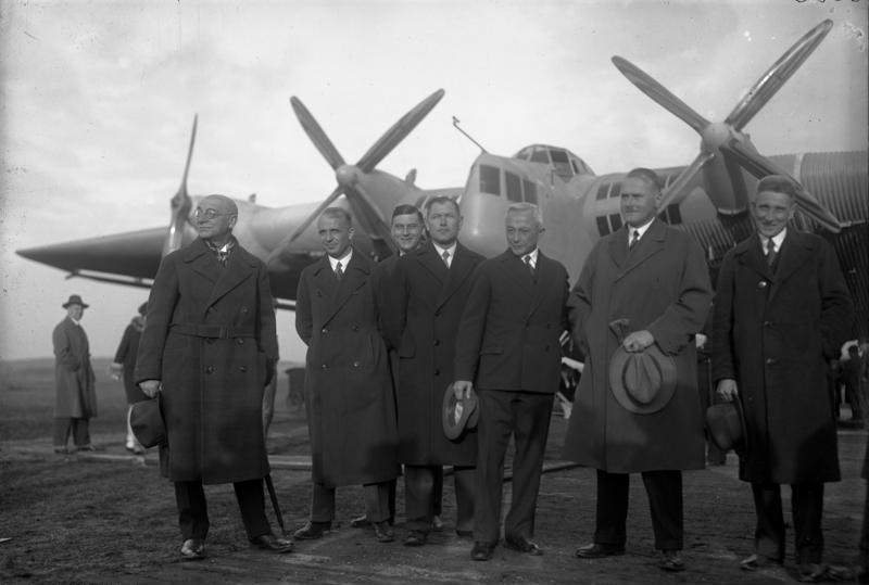 Das "fliegende Haus", das grösste deutsche Landflugzeug der Welt! Der General-Construkteur Prof. Junkers (x) mit seinen Mitarbeitern vor dem neuen Riesen-Flugzeug G. 38.